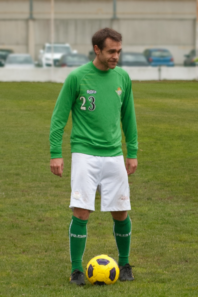 Nacho (Ignacio Pérez Santamaría), futbolista.